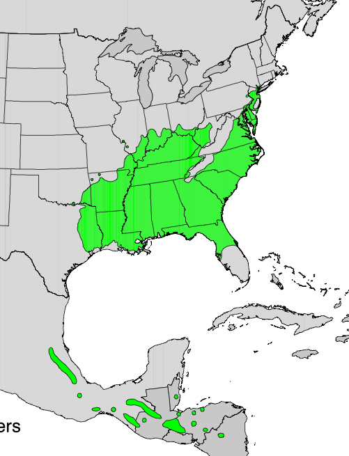 Range map of Liquidambar styraciflua